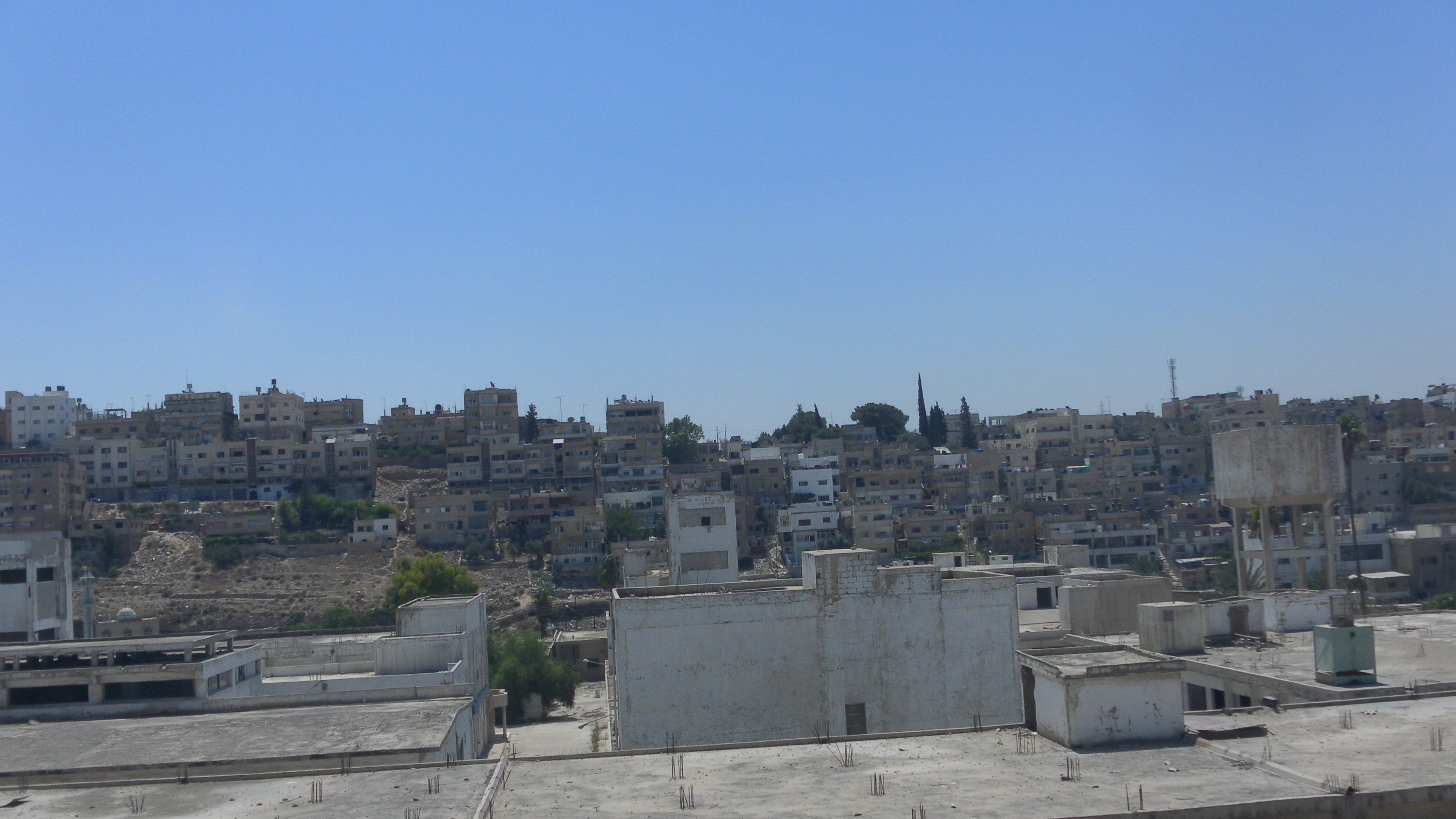 منظر من الجبل الجنوبي في الرصيفة, الزرقاء